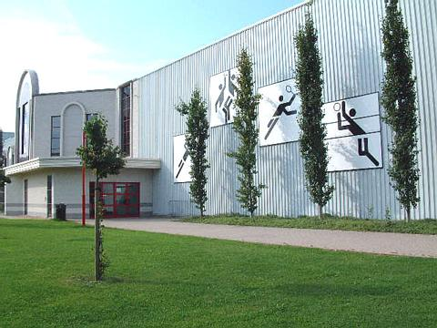 Ettelbréck: Centre sportif.